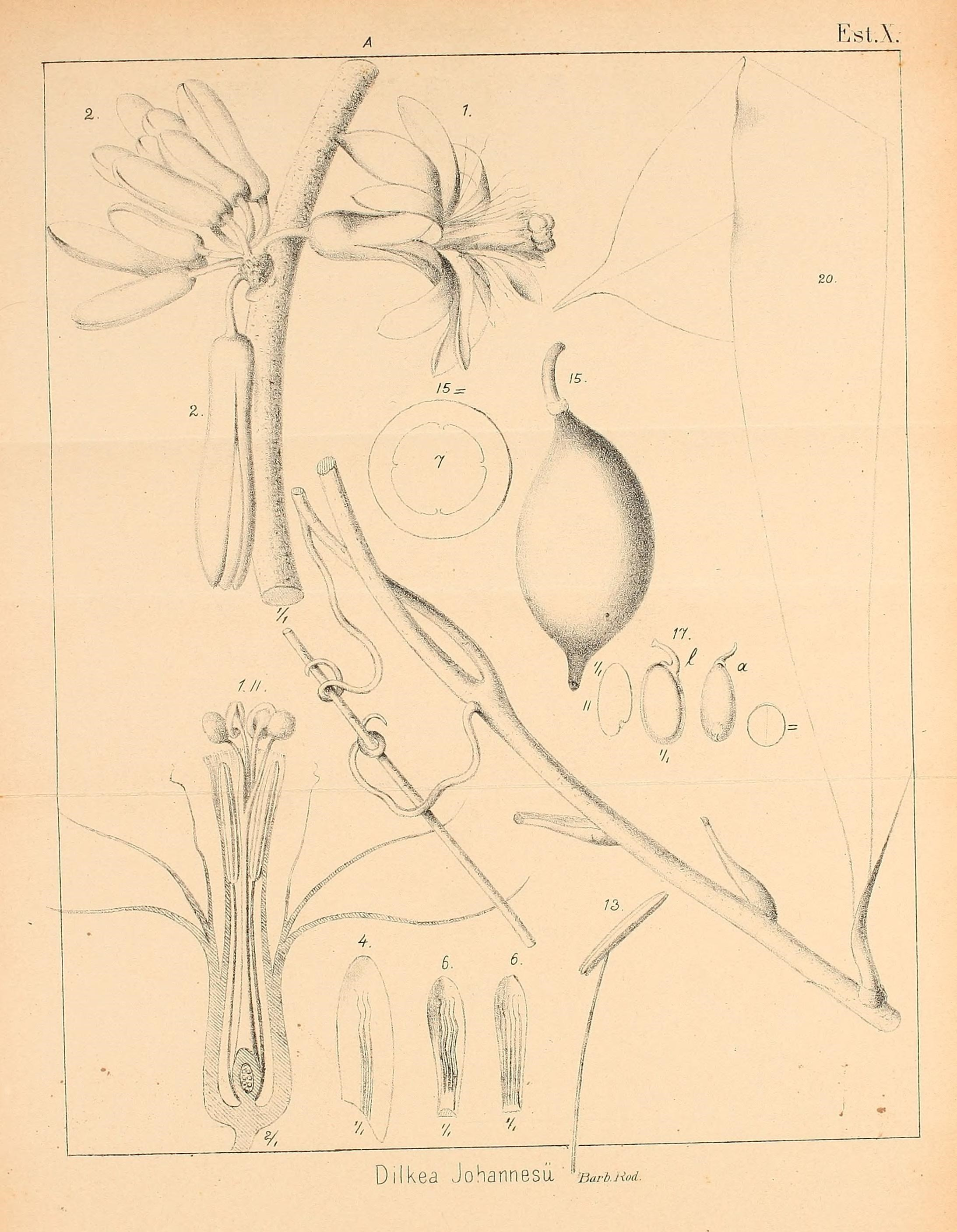 Est.X Dilkea Johannesíi. :i 'BariJiod.